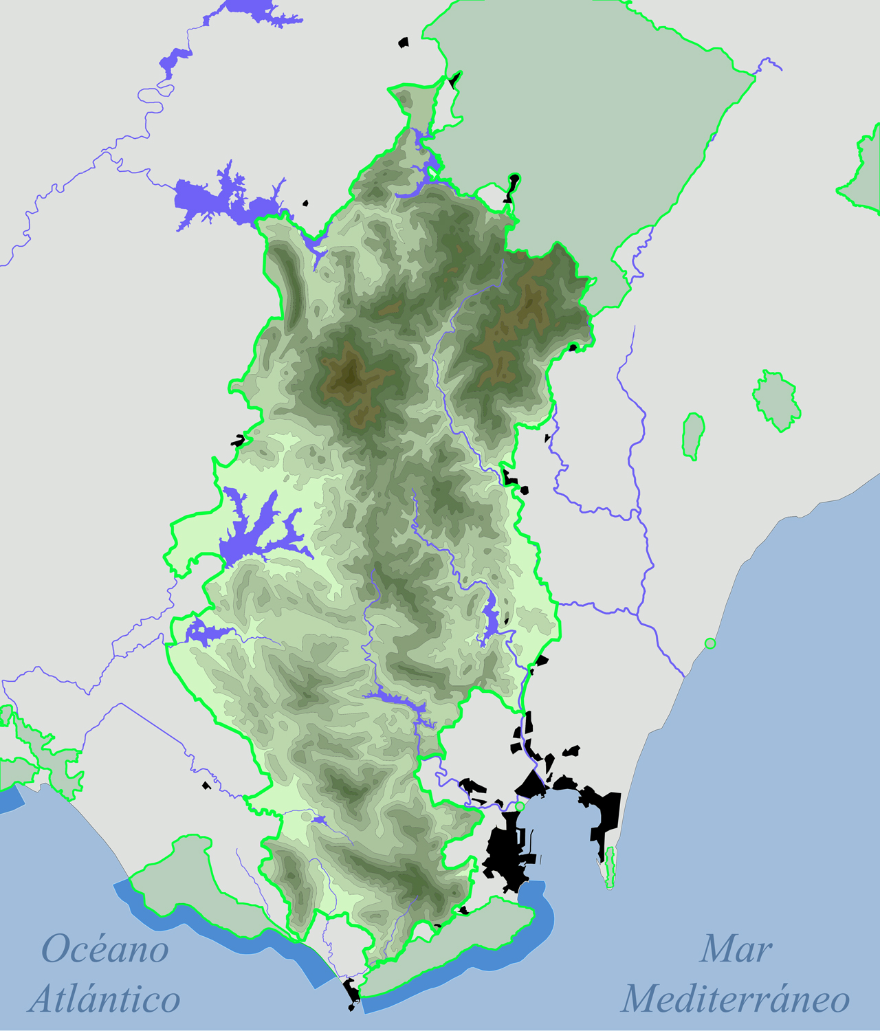 Mapa indicativo de la situación en el sur de la península Ibérica del parque natural de los Alcornocales, Andalucía, España